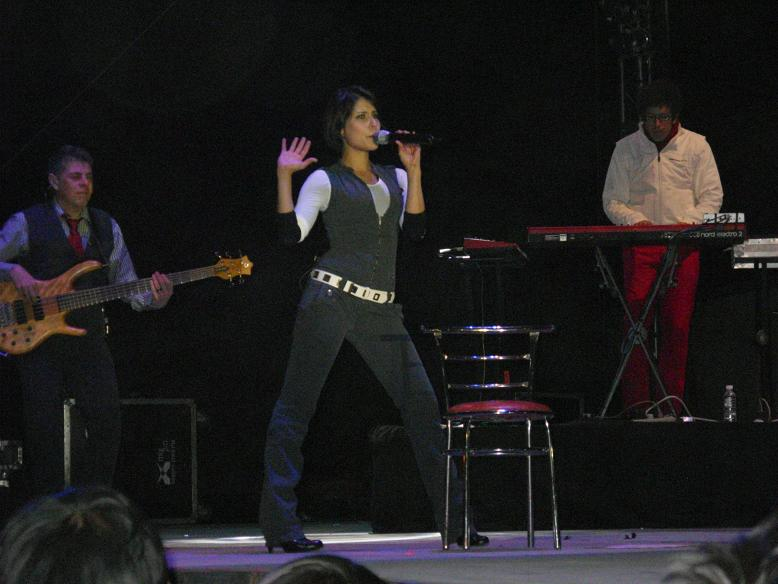 Playa Limbo en el concierto que ofrecieron en la feria de la ciudad de Santiago de Querétaro en diciembre del 2008